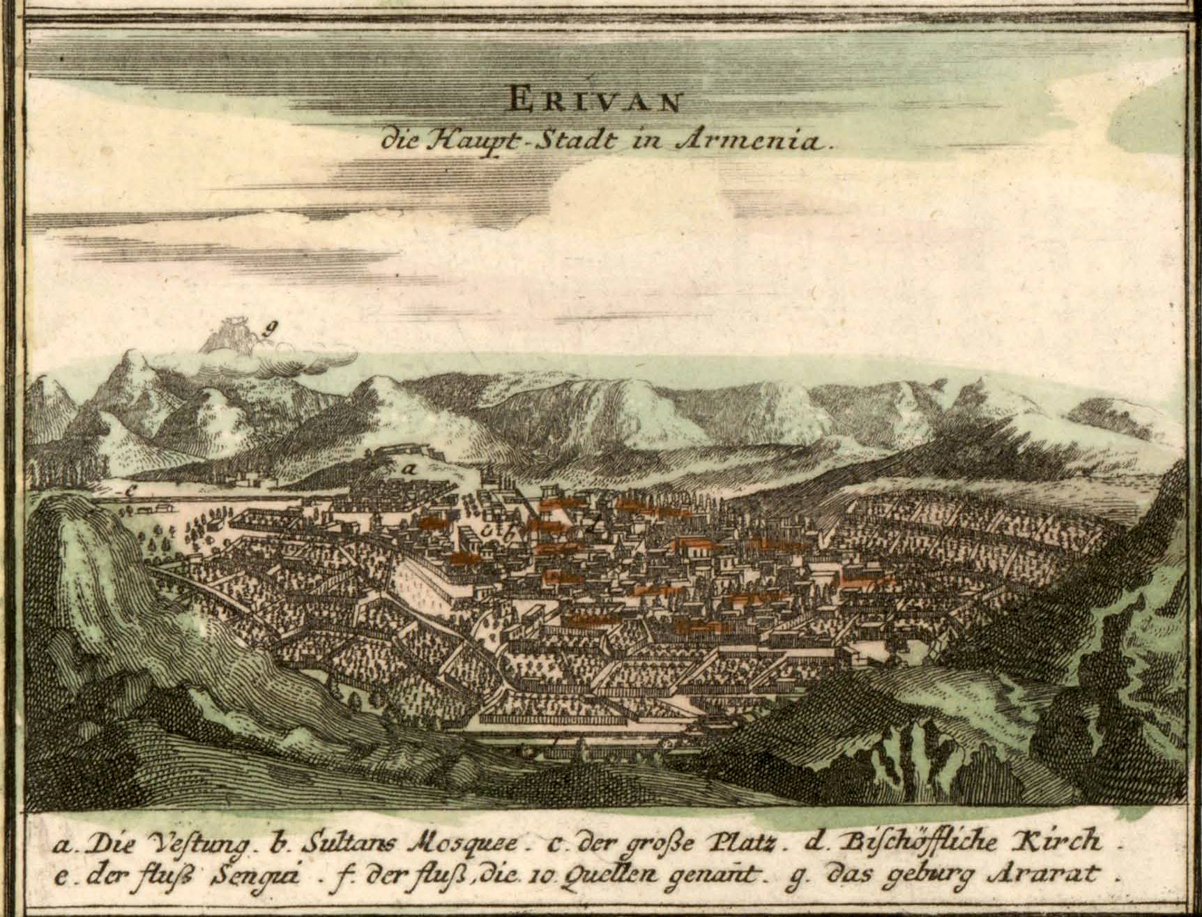 Erivan die Haupt-Stadt in Armenia